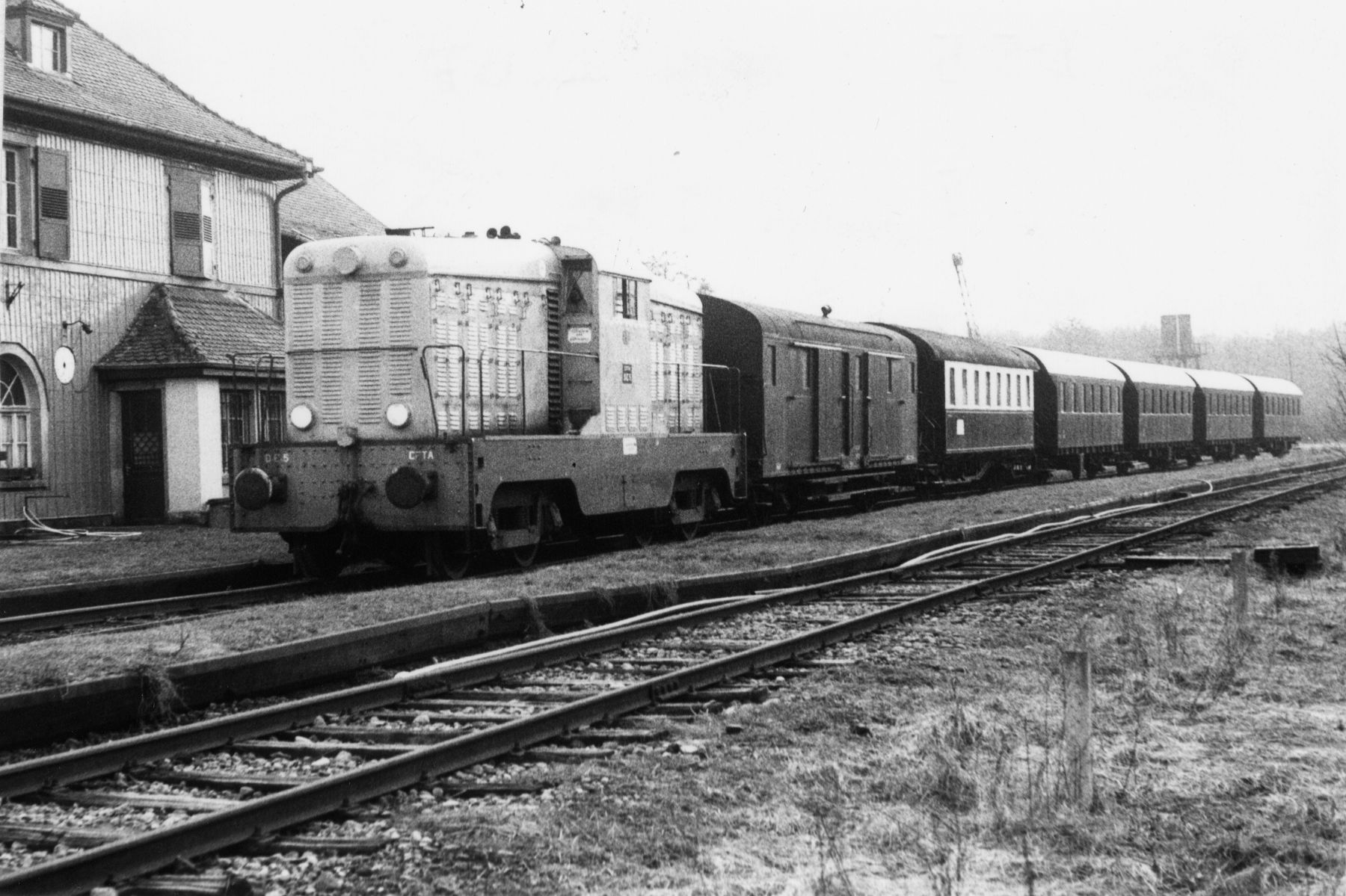 Locotracteur DE5 des CFTA de Gray + rame de B7 ex SNCF en gare de Burnhaupt-le-Haut(68)